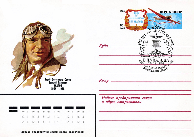 Герой Советского Союза Валерий Павлович Чкалов (1904-1938). 80 лет со дня рождения. Маркированный почтовый конверт СССР с оригинальной маркой номиналом 5 копеек (авиа тариф). 1984 год. Дата подписания в печать - 9 декабря 1983.